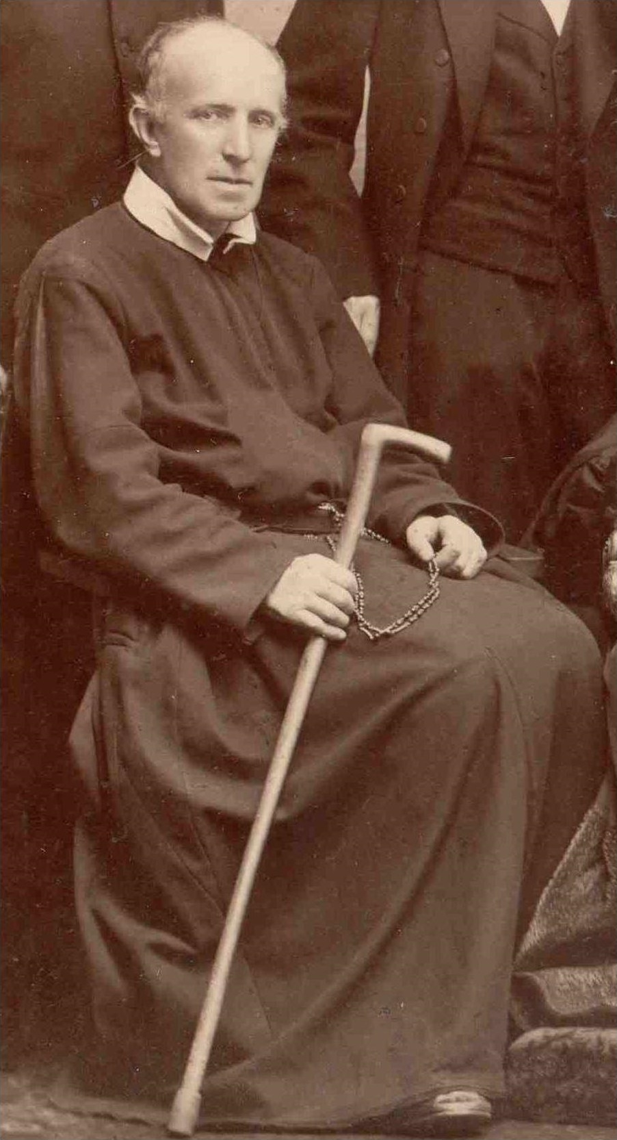 O. Bernard Łubieński CSsR